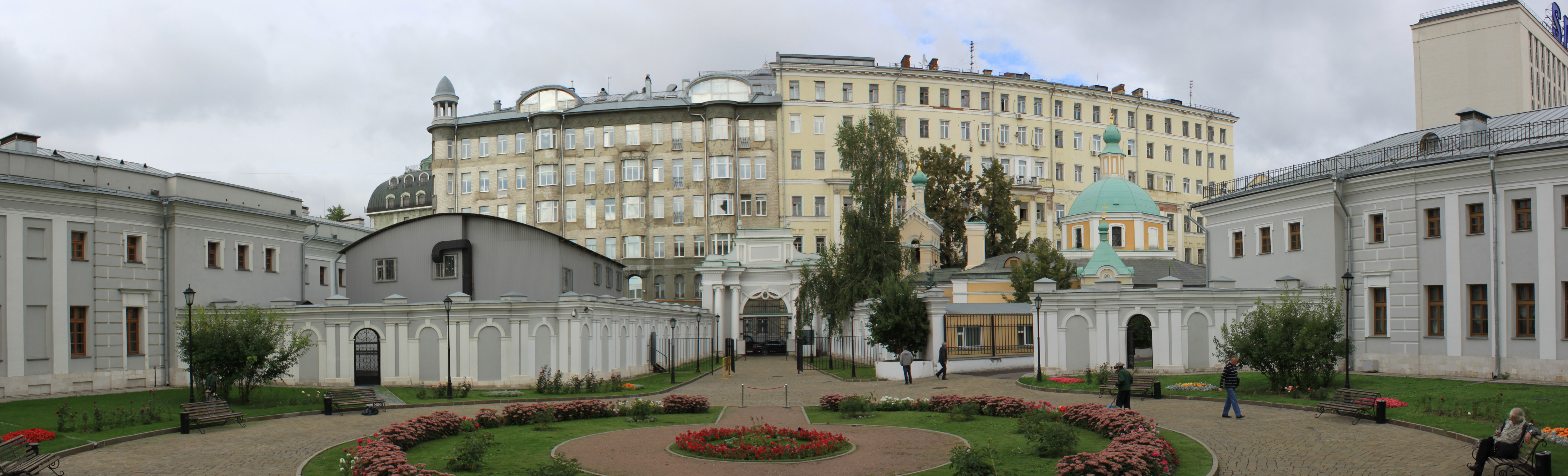 Стены парадного двора (парадный двор) (Москва и Московская область, Москва, Староваганьковский переулок (Маркса-улица Энгельса, 14))